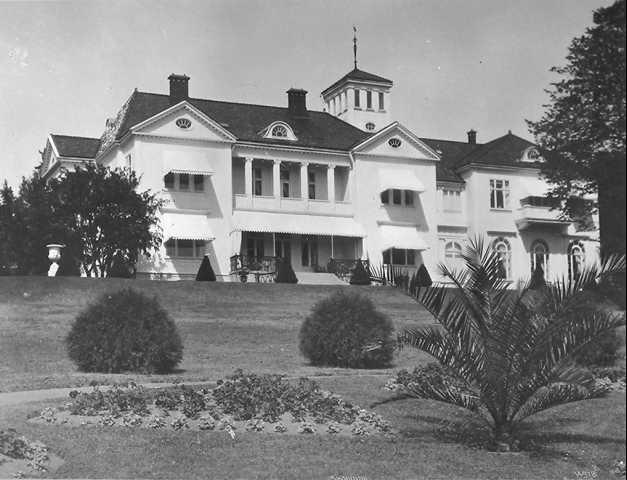 Minister Jarlsberg's estate Skaugum in Asker.